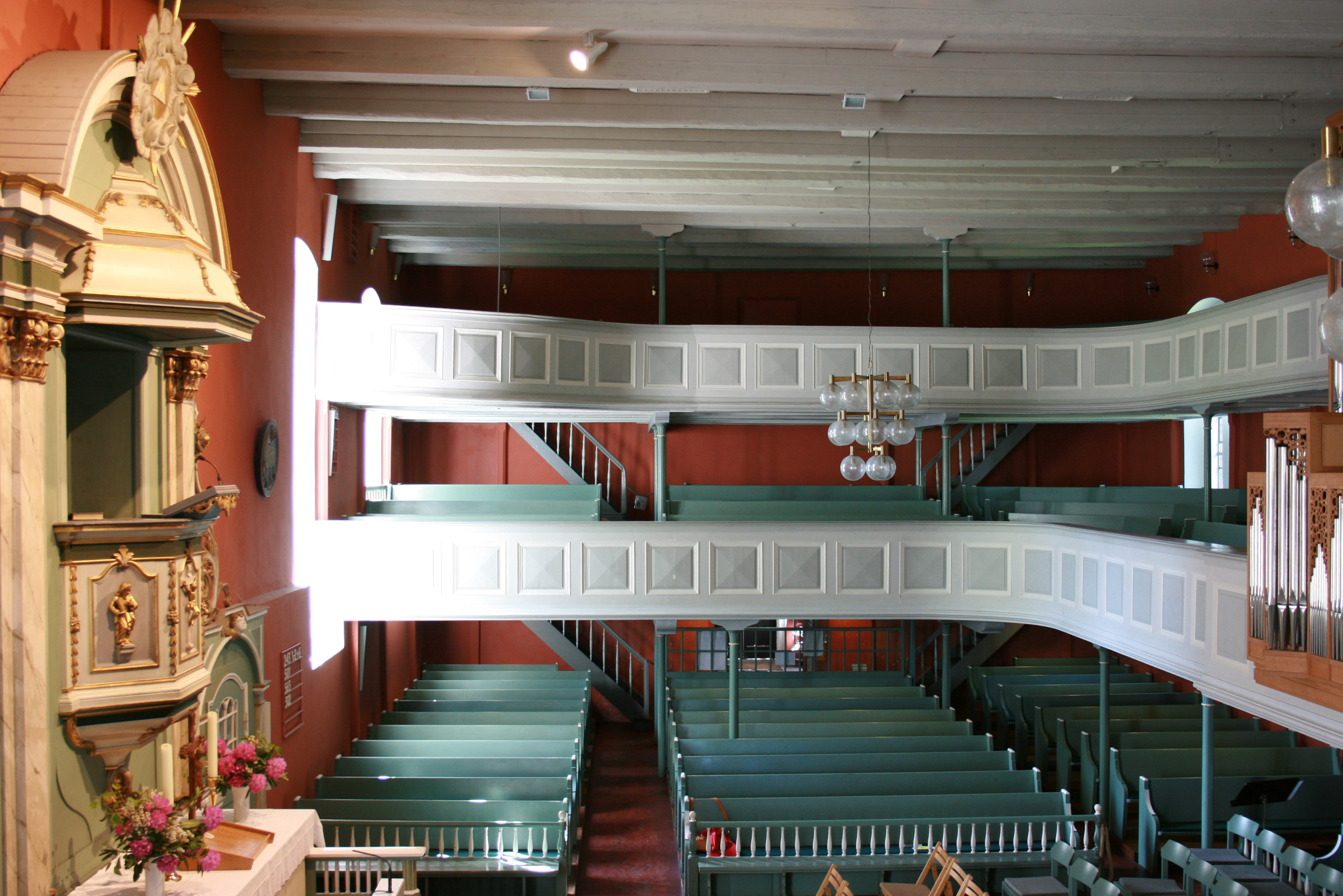 Kirche St. Peter und Paul, Friedenstraße in Schneverdingen